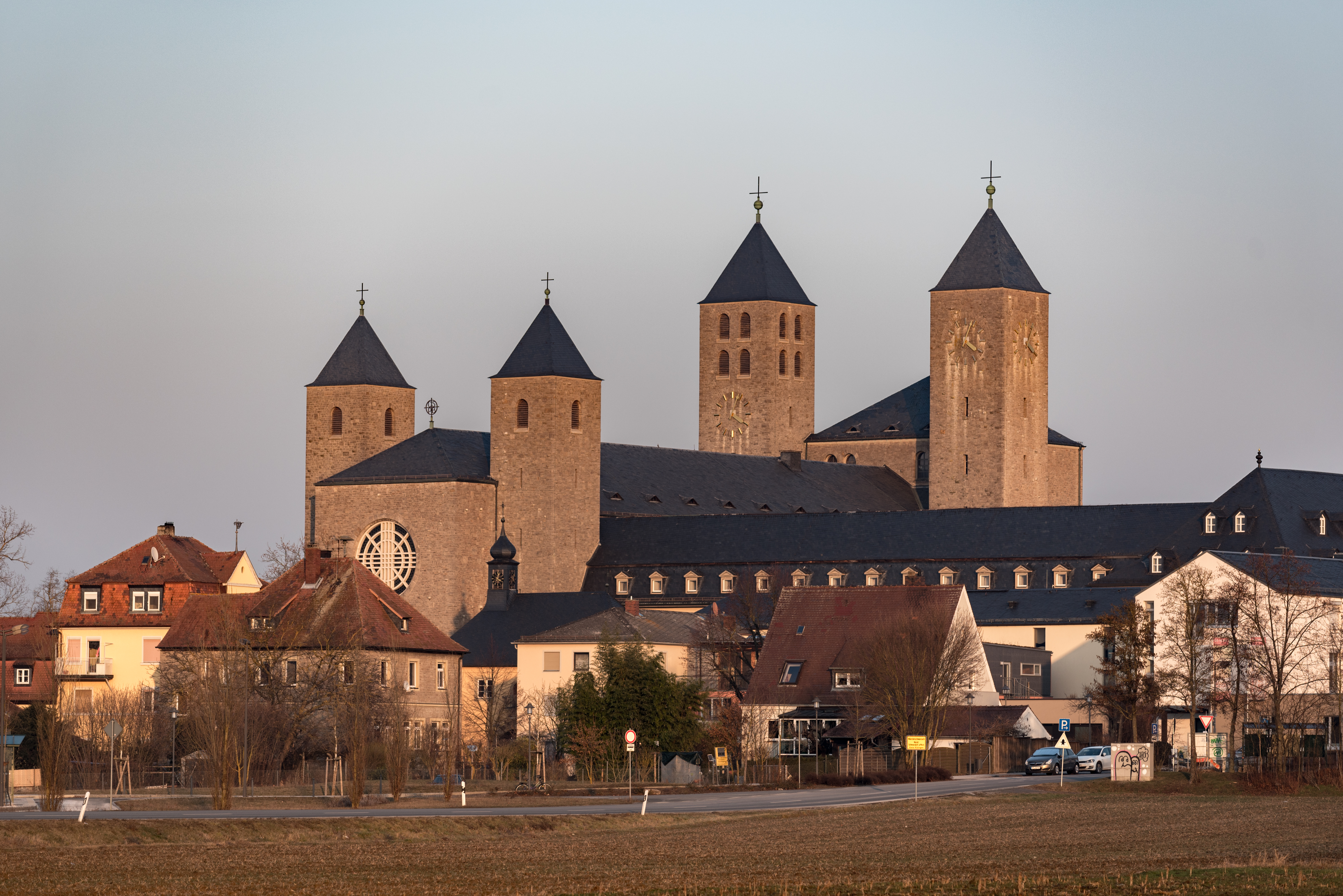 Schwarzach am Main, Kirche von Münsterschwarzach